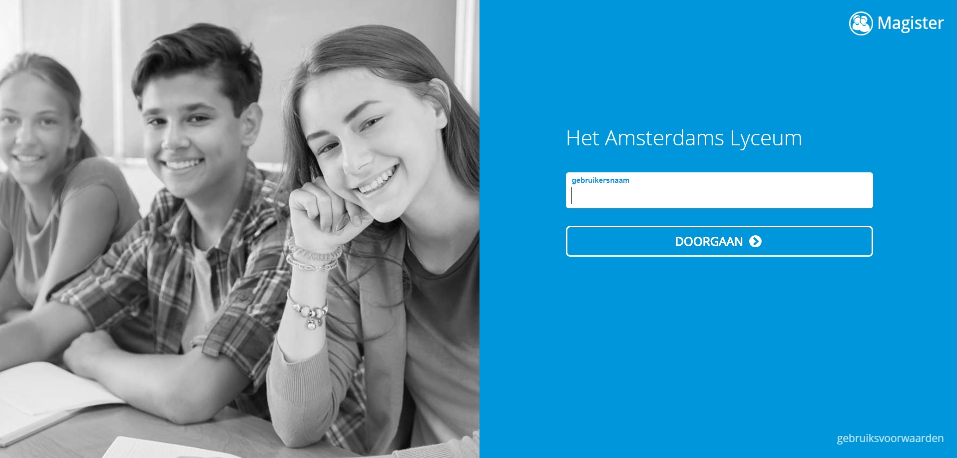 Magister 6, screenshot, alle rechten gaan naar School master